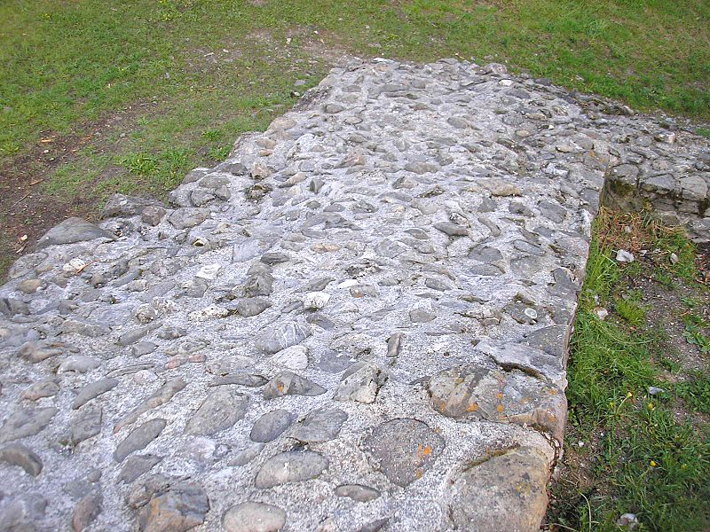 Burg Wolkenberg bei Wildpoldsried (Landkreis Oberallgäu, Bayerisch-Schwaben). Die Fundamente des Bergfriedes. Eigene Aufnahme, Mai 2008 / Wolkenberg castle near Wildpoldsried (Landkreis Oberallgäu, Bavaria, Germany). The founding walls of the keep. Own photo, May 2008